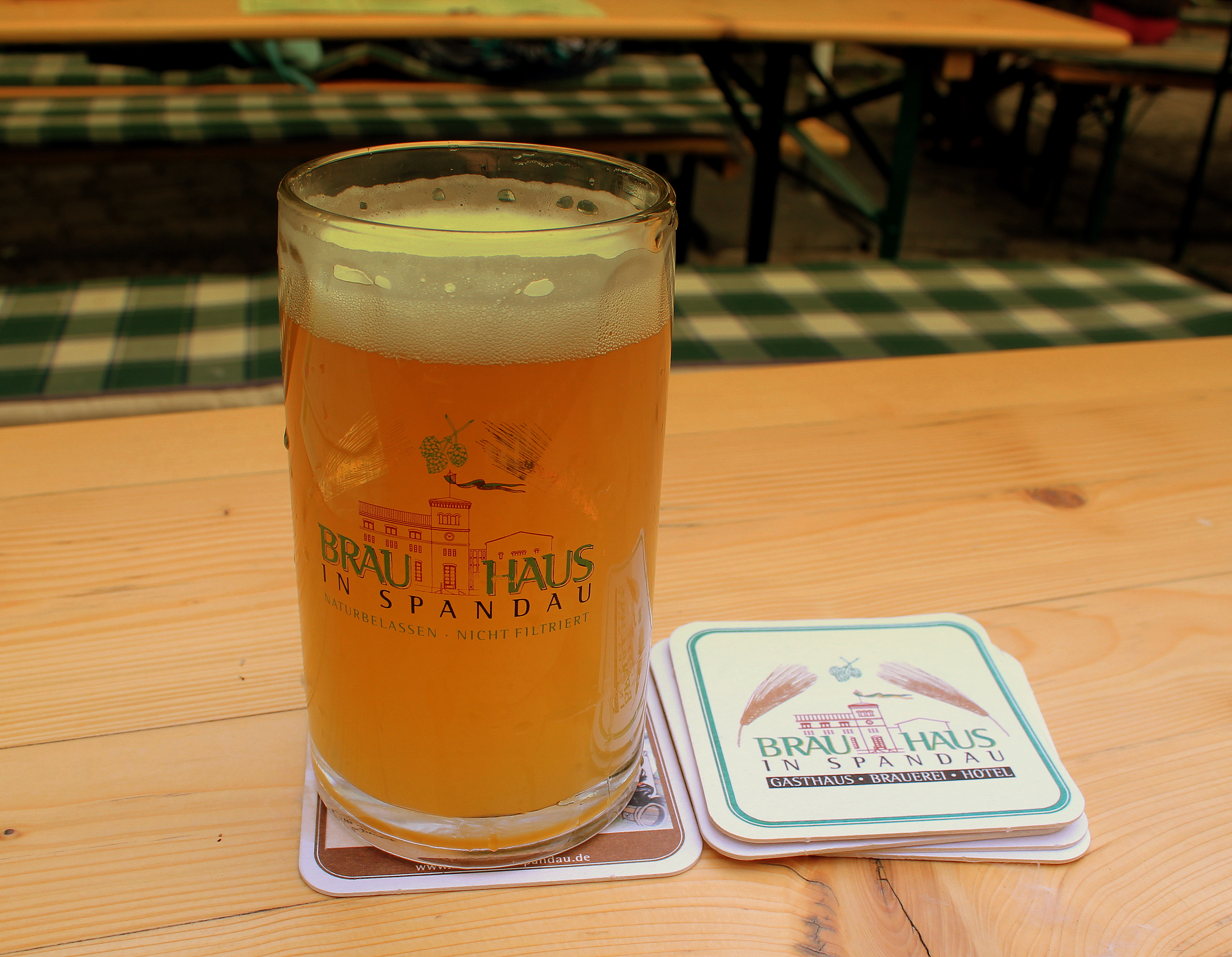 BRAUHAUS IN SPANDAU HELLE BEER SPANDAU BERLIN GERMANY JUNE 2013